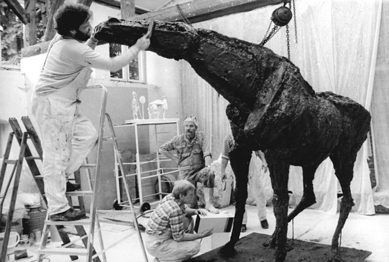 ADN-ZB-Sindermann-2.9.1988-pe-Bez. Rostock: Prof. Jo Jastram (Hintergrund mitte), wird am 4.9.88, 60 Jahre alt. In seinem Atelier bei Kneese (Kreis Ribnitz-Damgarten) wird zur Zeit eine Hengst-Plastik des Künstlers von Mitarbeitern der Werkstatt für kunsthandwerkliche Metallspritztechnik Rostock "Ausstellungsreif" gemacht. Diese Figur, die für das Berliner Neubaugebiet Hohenschönhause bestimmt ist, wird in einer Rostocker Ausstellung zum Jubiläum des Künstlers gezeigt. (siehe 14N). Soeben fertiggestellt wurde auch ein Fischerbrunnen für den Marktplatz der Stadt Greifswald, dessen Firguren gegenwärtig in Bronze gegossen werden."